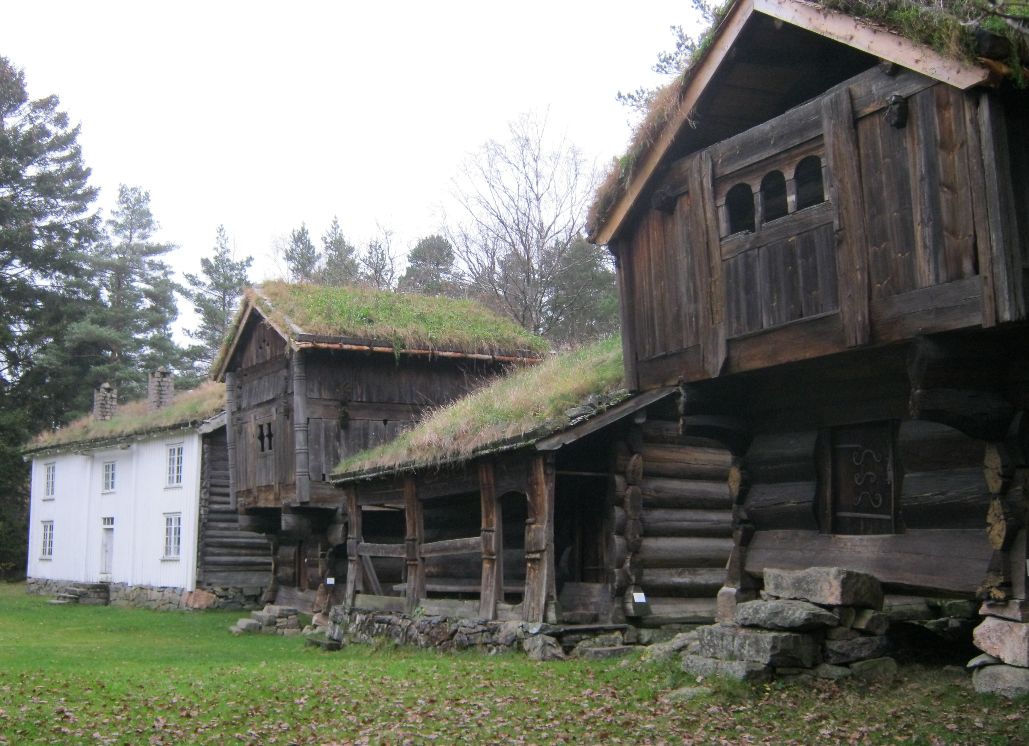 Vest-Agder-museet Kristiansand: Setesdalstunet (del)